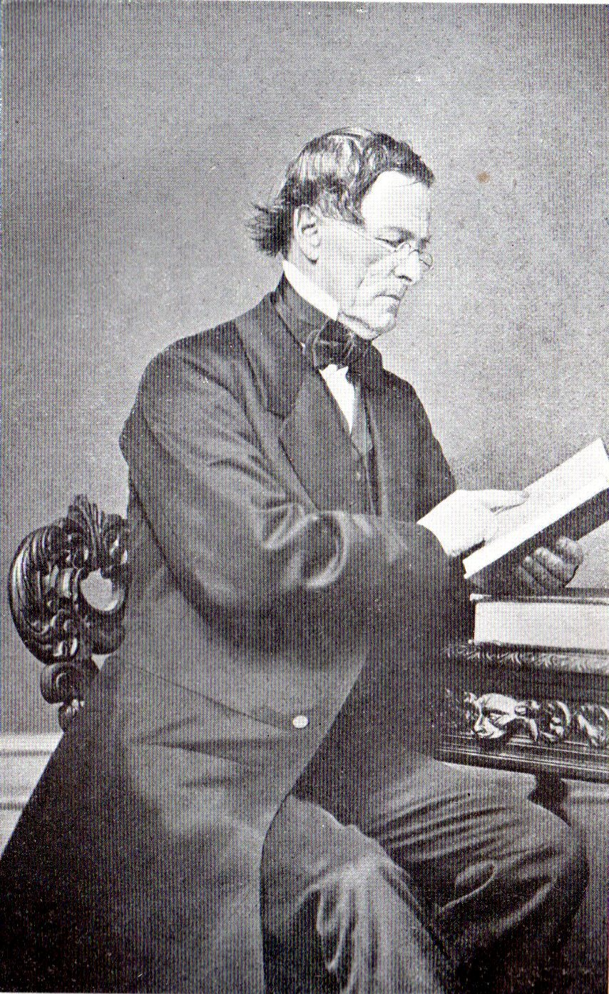 M. Louis Jeanmaire (1802-1883), pasteur du Magny-Danigon (Haute-Saône). Source :Edouard Favre, François Coillard : Enfance et jeunesse (tome 1), Société des Missions Evangéliques, Paris, 1908.